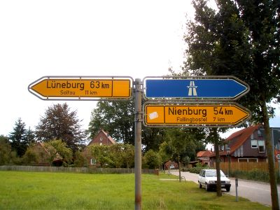 Ehemalige B 209 zwischen Bad Fallingbostel und Soltau. Auf einigen alten Schildern ist noch heute die überklebte 209 zu erkennen.